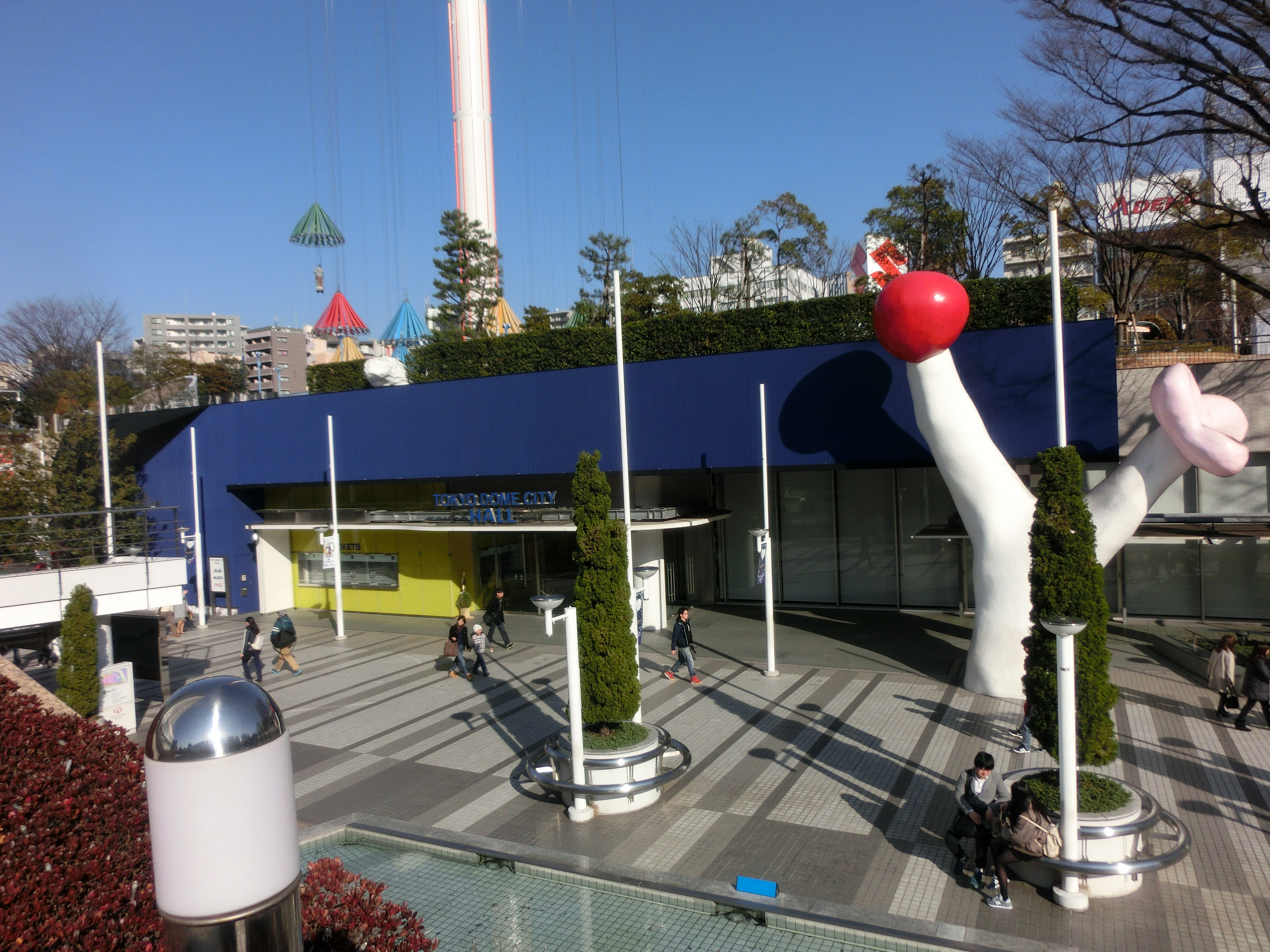 Tokyo Dome city hall